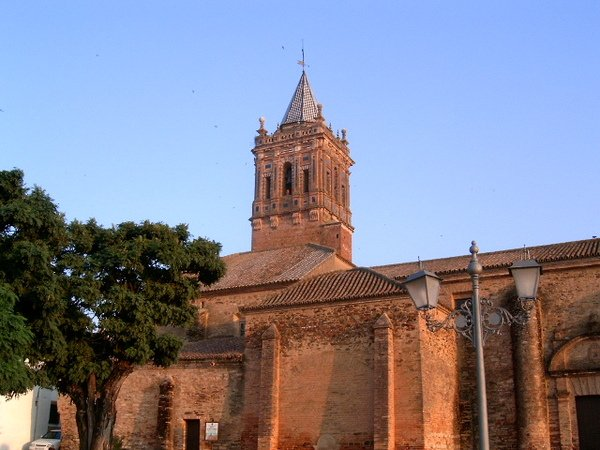 Vista desde el paseo redondo.